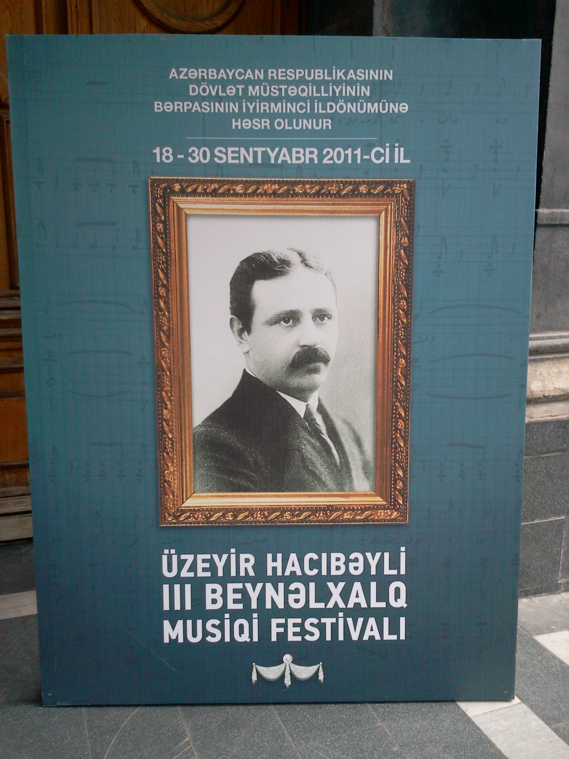 Музыкальный фестиваль, посвященный творчеству Узеира Гаджибекова